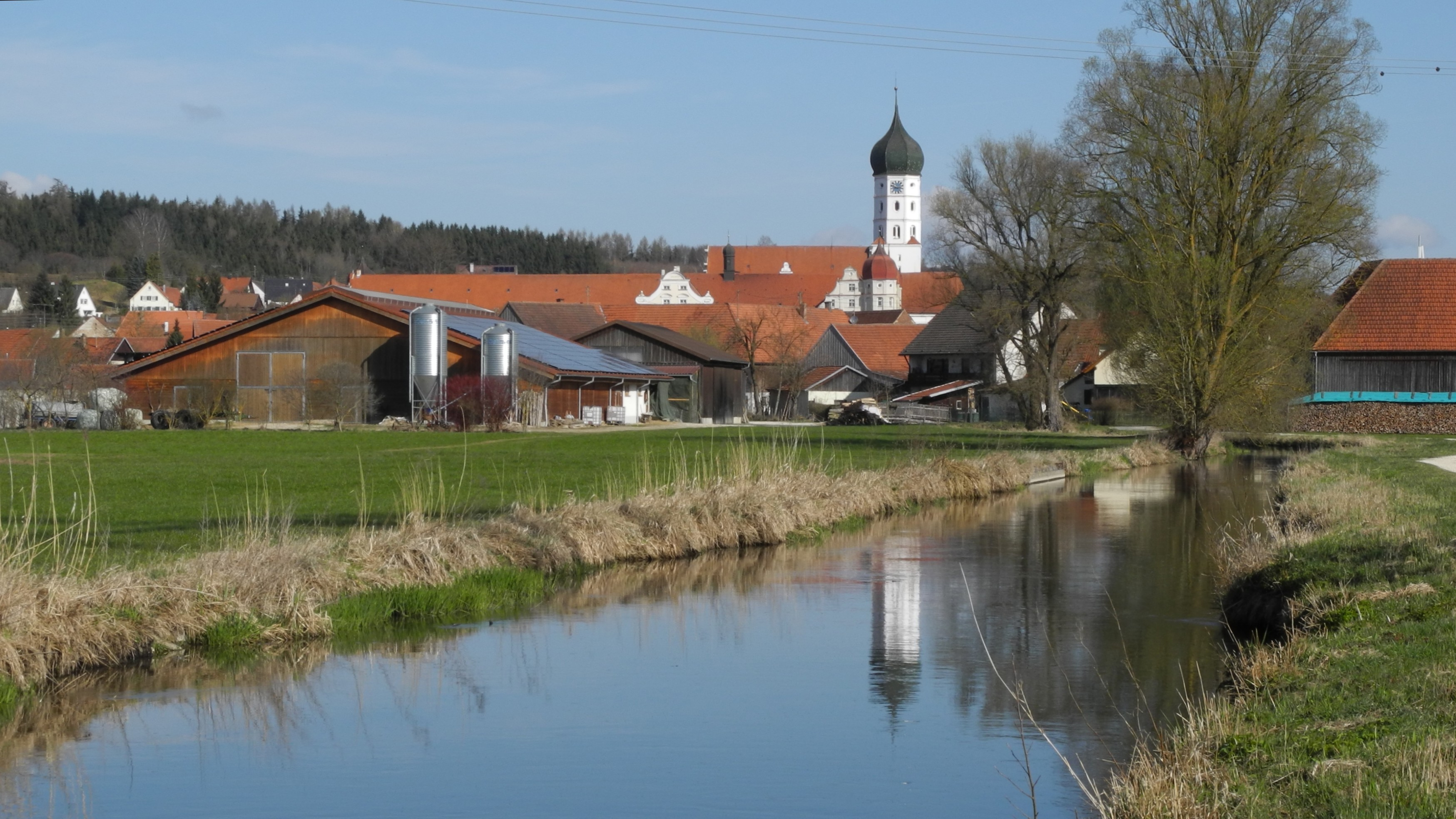 Wettenhausen aus südlicher Richtung, mit dem von der Kammel abzweigenden Mühlkanal; im Hintergrund Kloster Wettenhausen